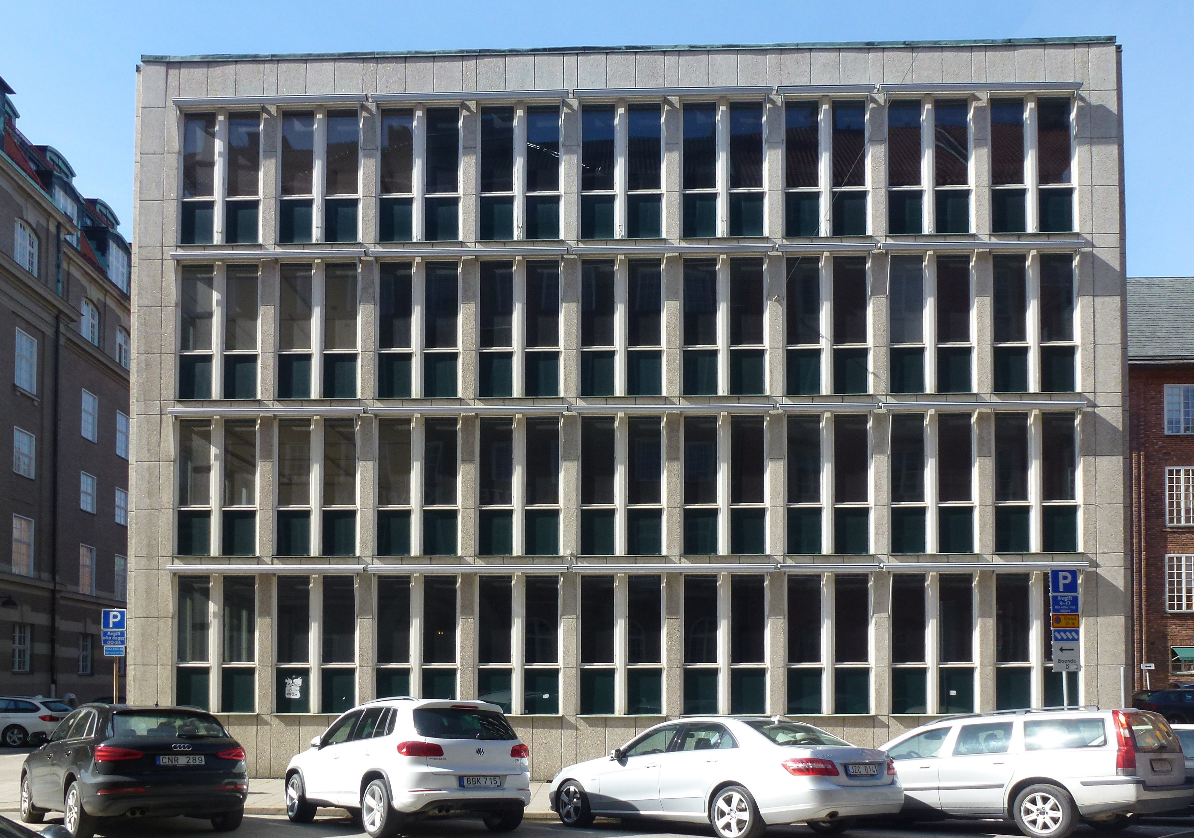 Patent- och registreringsverket, Artillerigatan Stockholm. Nybyggnadsår:1959 - 1963, Bengt Romare (Arkitekt) Georg Scherman (Arkitekt)